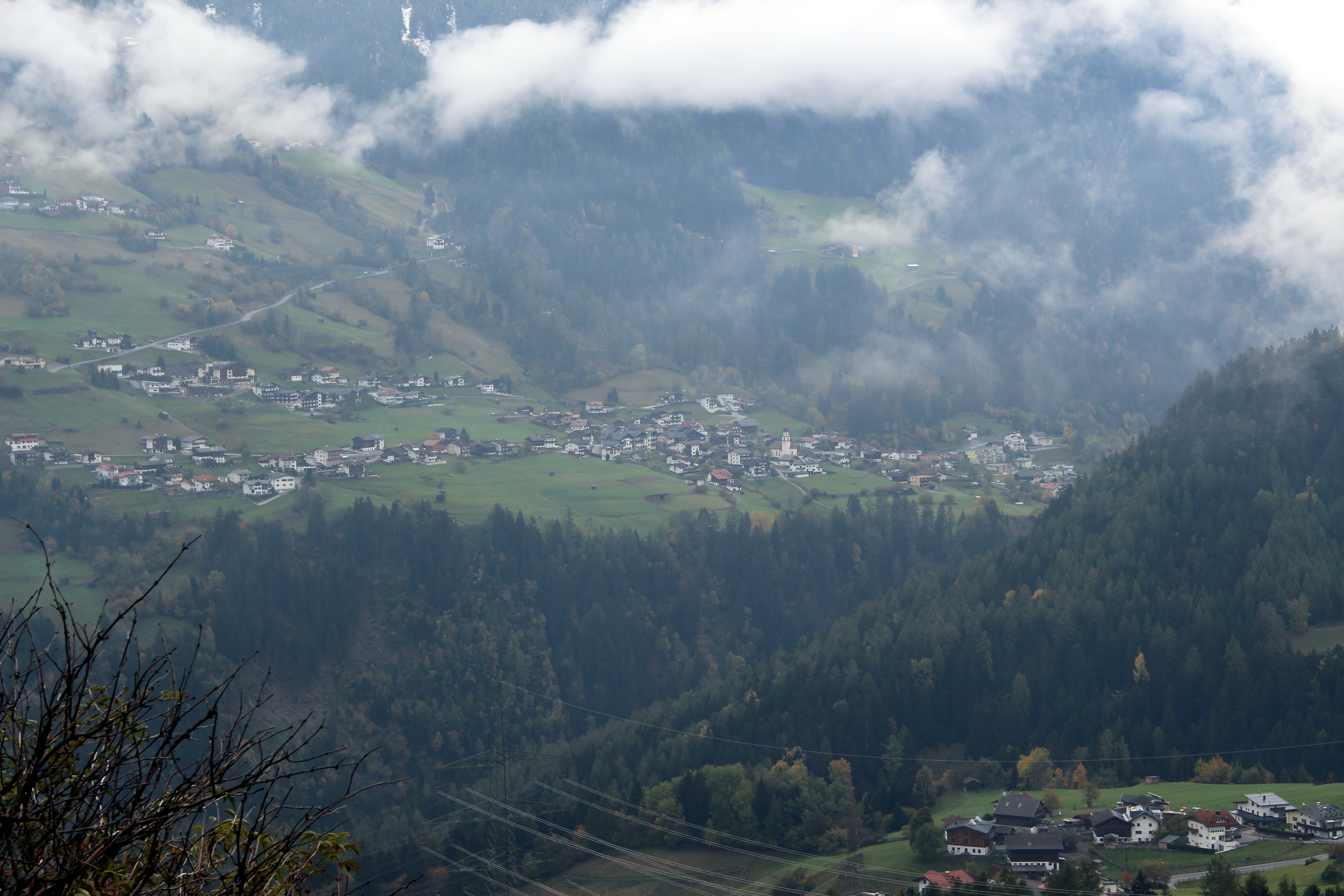 Ortsansicht von Jerzens von Nordwesten (Wenns) aus.